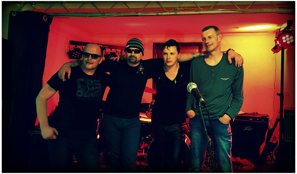 Metrs Anglijā